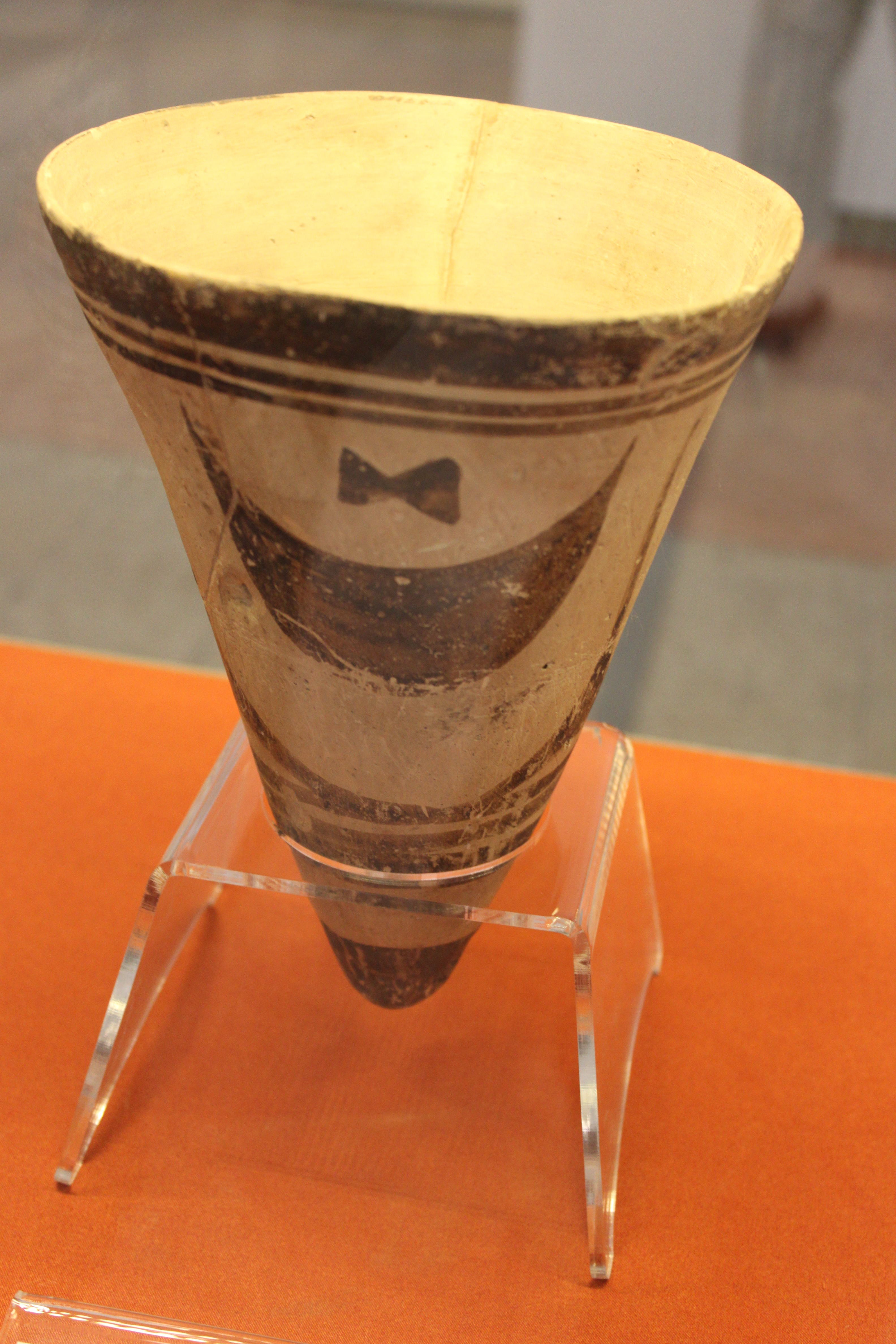 Conical pottery beaker from Tall-e Bakun (Fars province)- 4500- 4050 BC - Natioanl museum of Iran - Inventory number 9